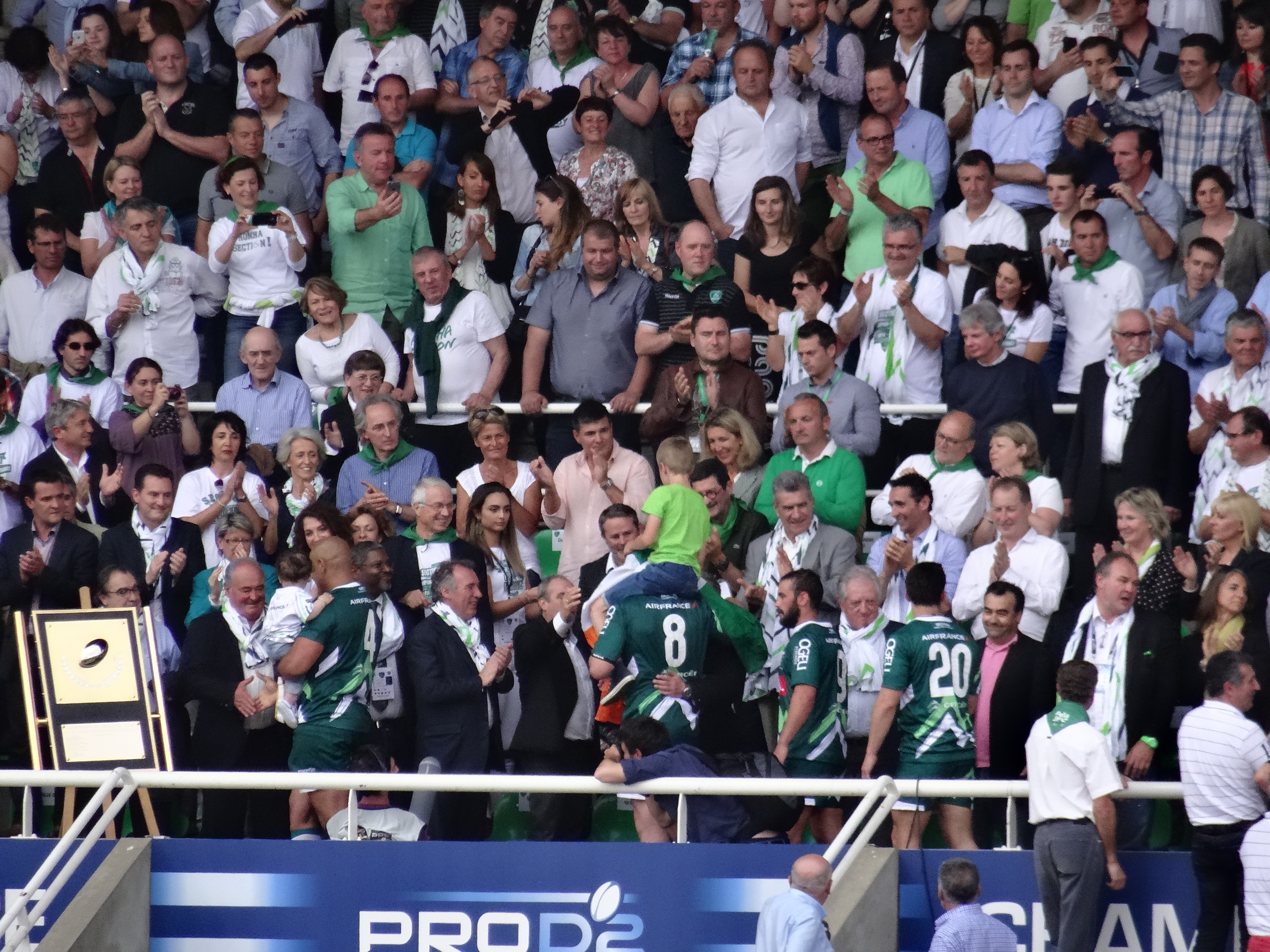 Remise du trophée de champion de Pro D2 à la Section paloise lors de la saison 2014-2015